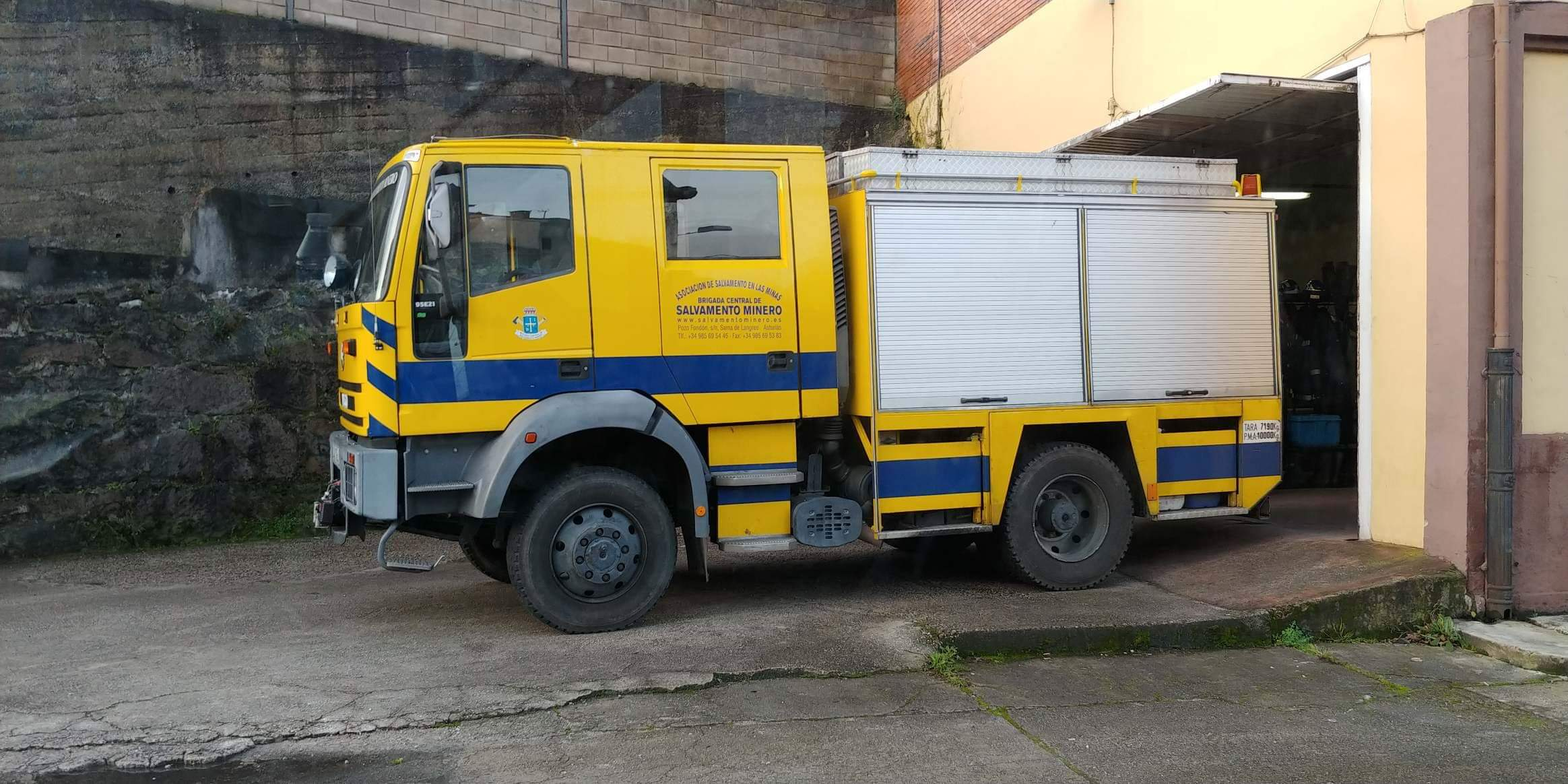 Brigada Central de Salvamento Minero en Sama de Langreo.